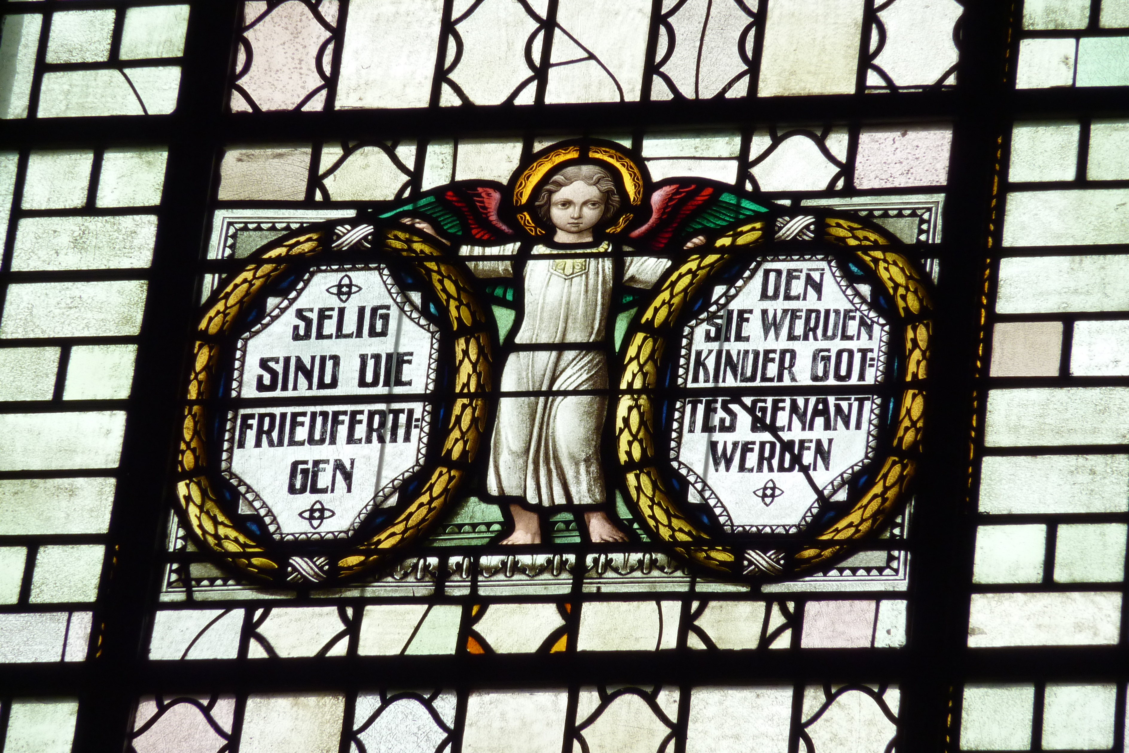 Bleiglasfenster in der katholischen Pfarrkirche St. Dionysius und Sebastian in Kruft, Darstellung (Ausschnitt): Seligpreisungen